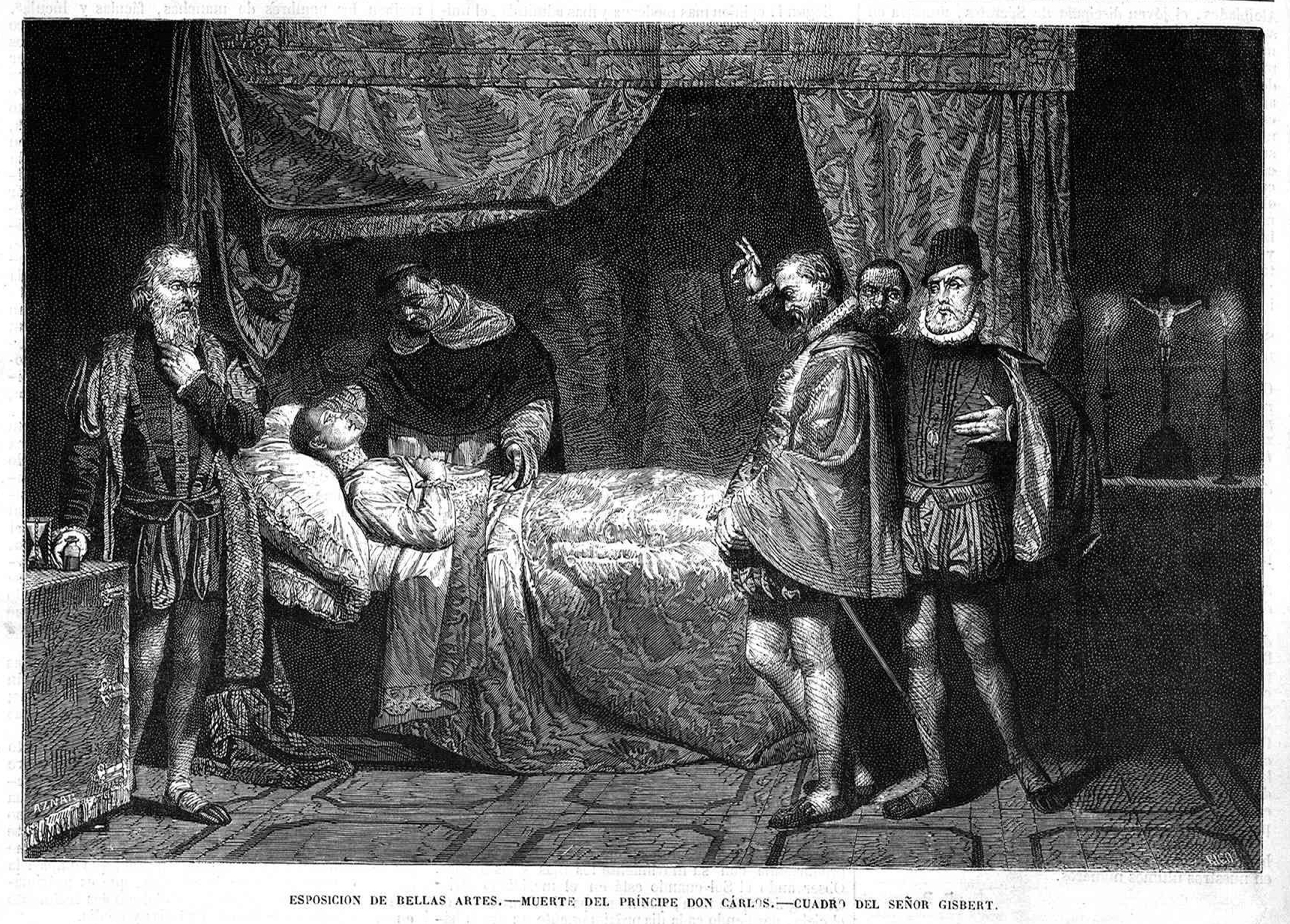 Exposición de Bellas Artes, muerte del príncipe Don Carlos, en la revista española El Museo Universal.